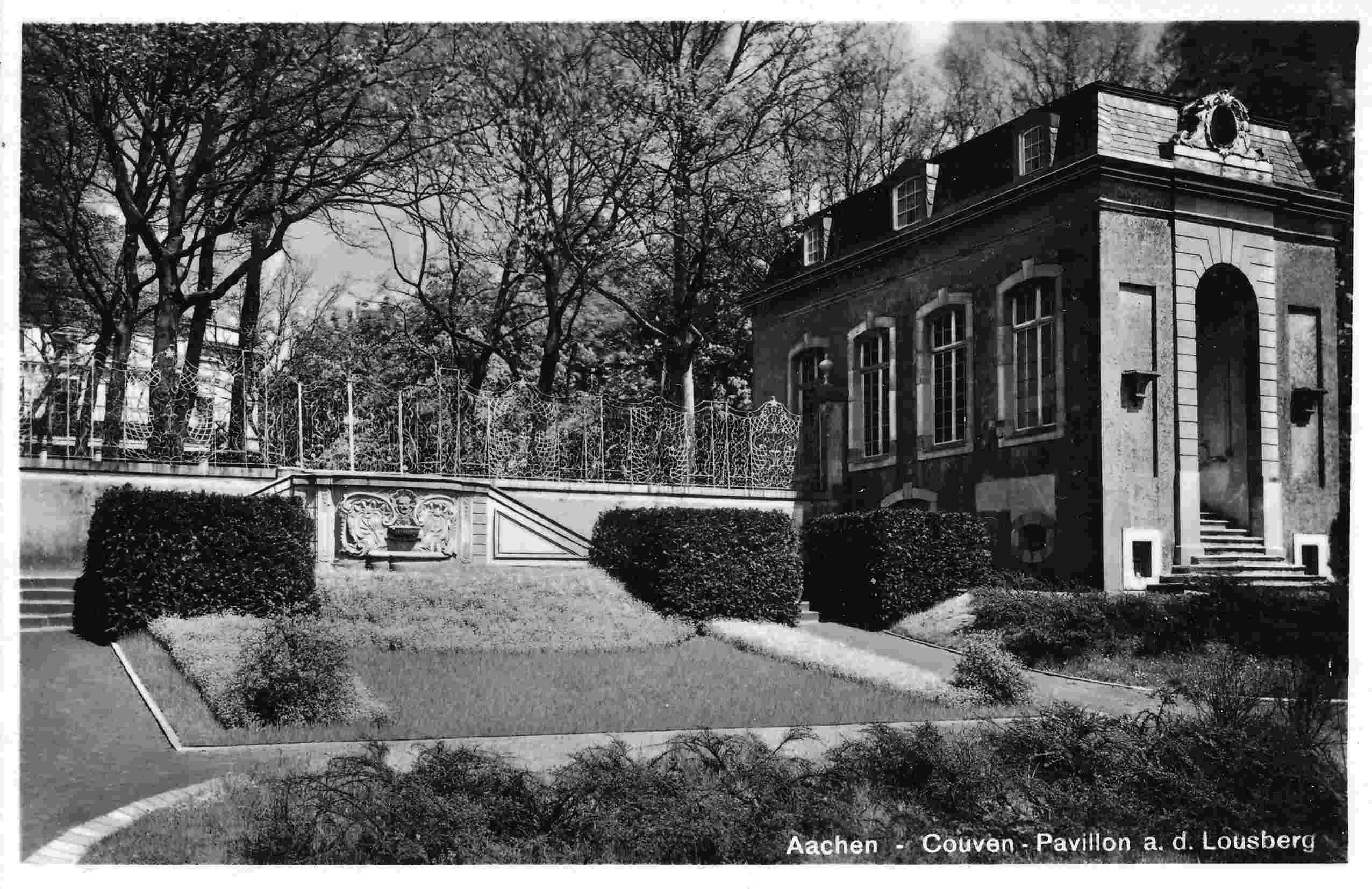 Gartenhaus Mantels (Kerstenscher Pavillon) kurz nach der Translozierung auf den Lousberg. Im Hintergrund (li.) das Belvedere